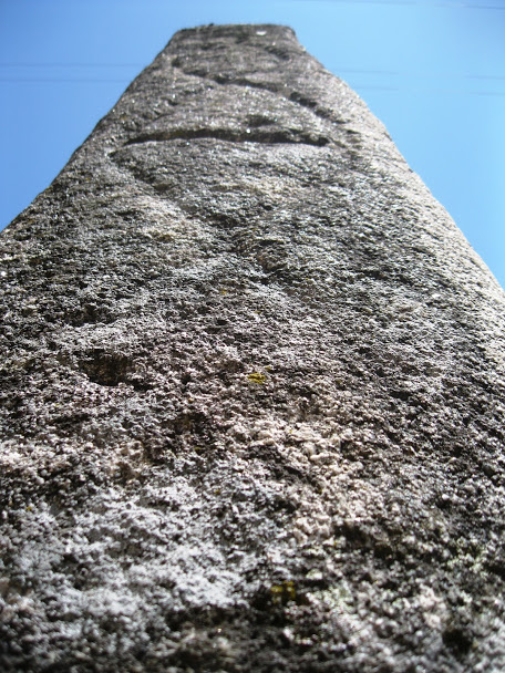 Menir